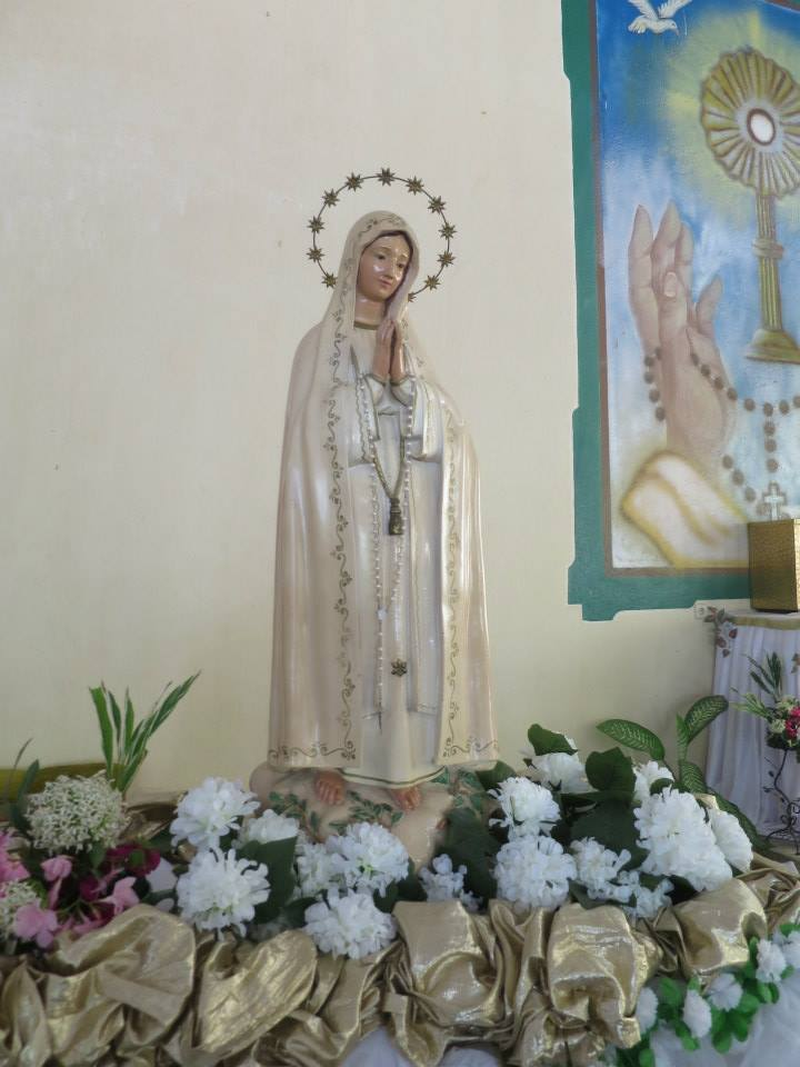 Igreja de S. João Bosco de Laga